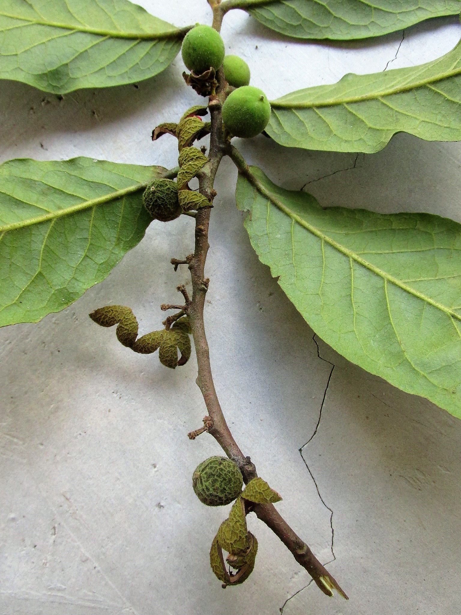 Maturação de Frutos de Tabocuva